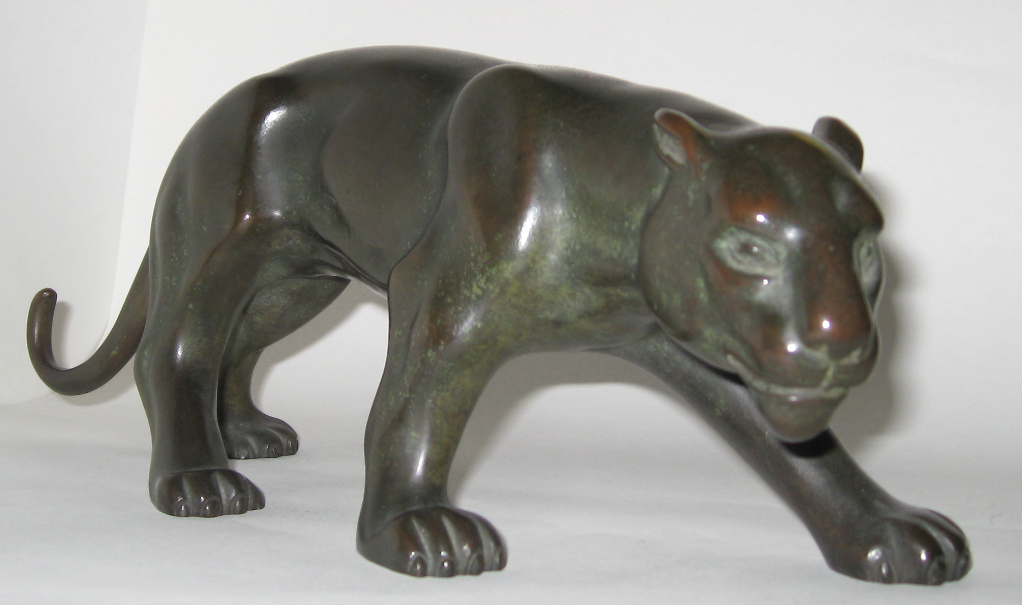 Tiger. Kunstguss aus Bronze